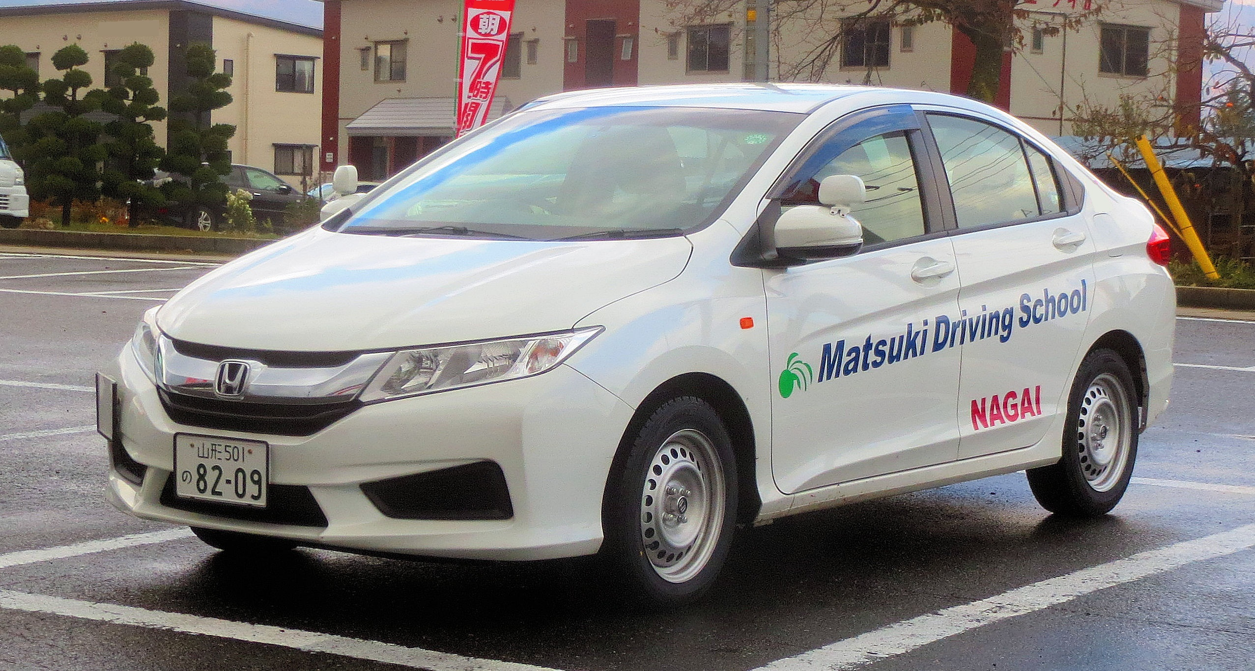 ホンダ・グレイス 長井ドライビングスクール教習車（山形県)